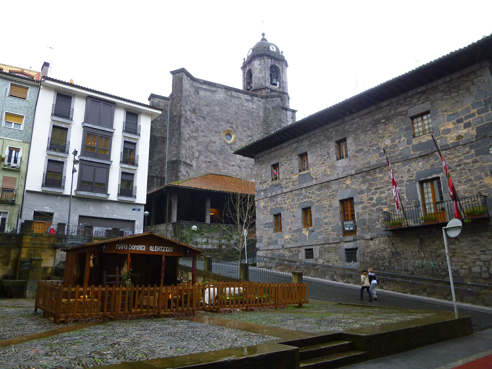 Soraluze (Gipúzkoa)